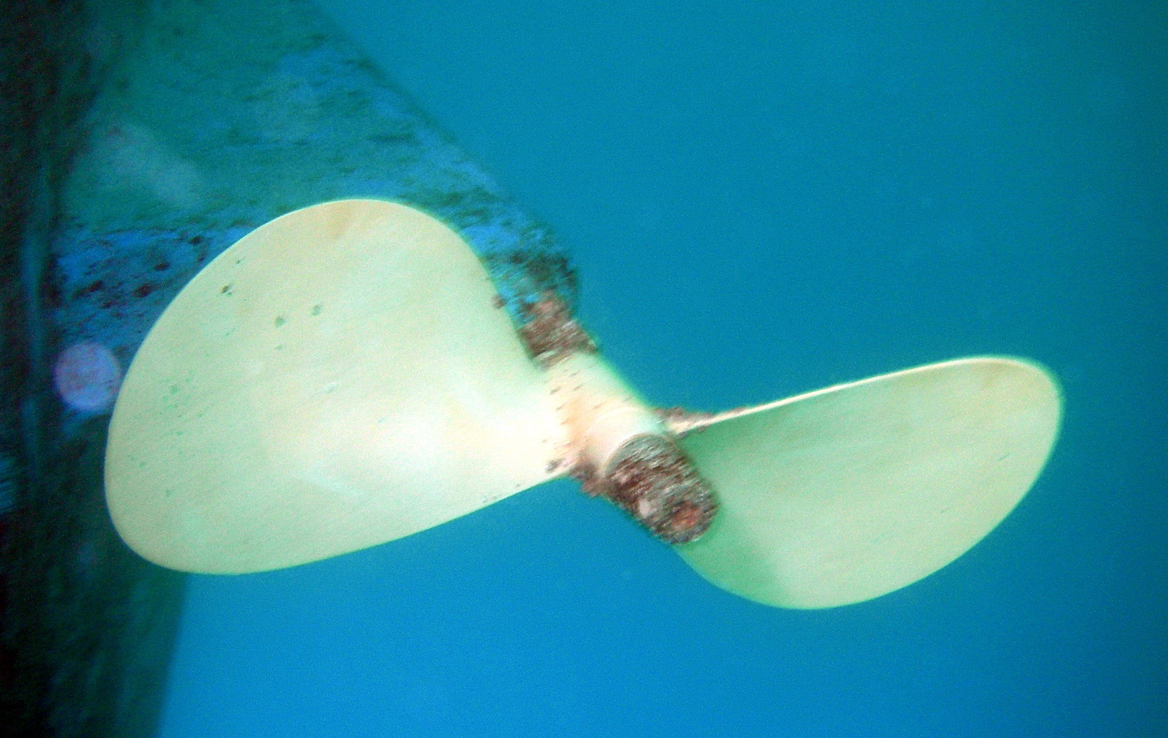 2-flügeliger Festpropeller eine Oceanis 331